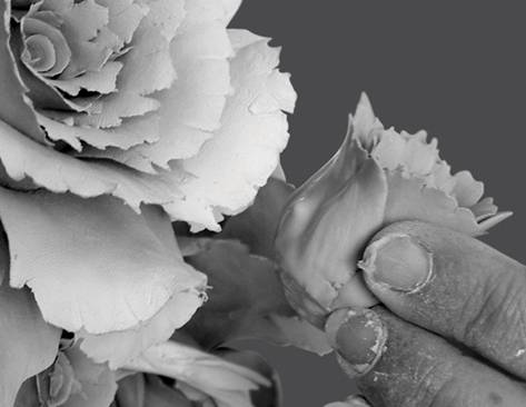 Lavorazione della porcellana di Capodimonte (Napoli).